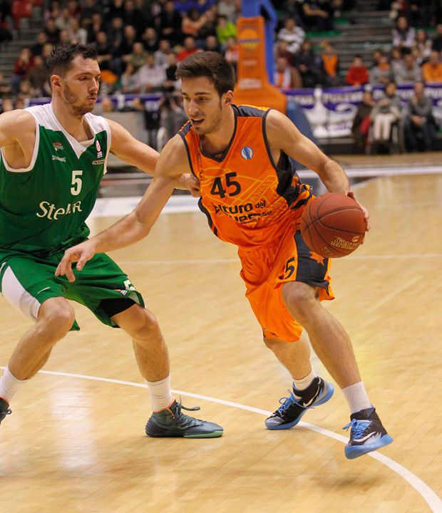 David Guardia en su debut europeo con el Valencia Basket.